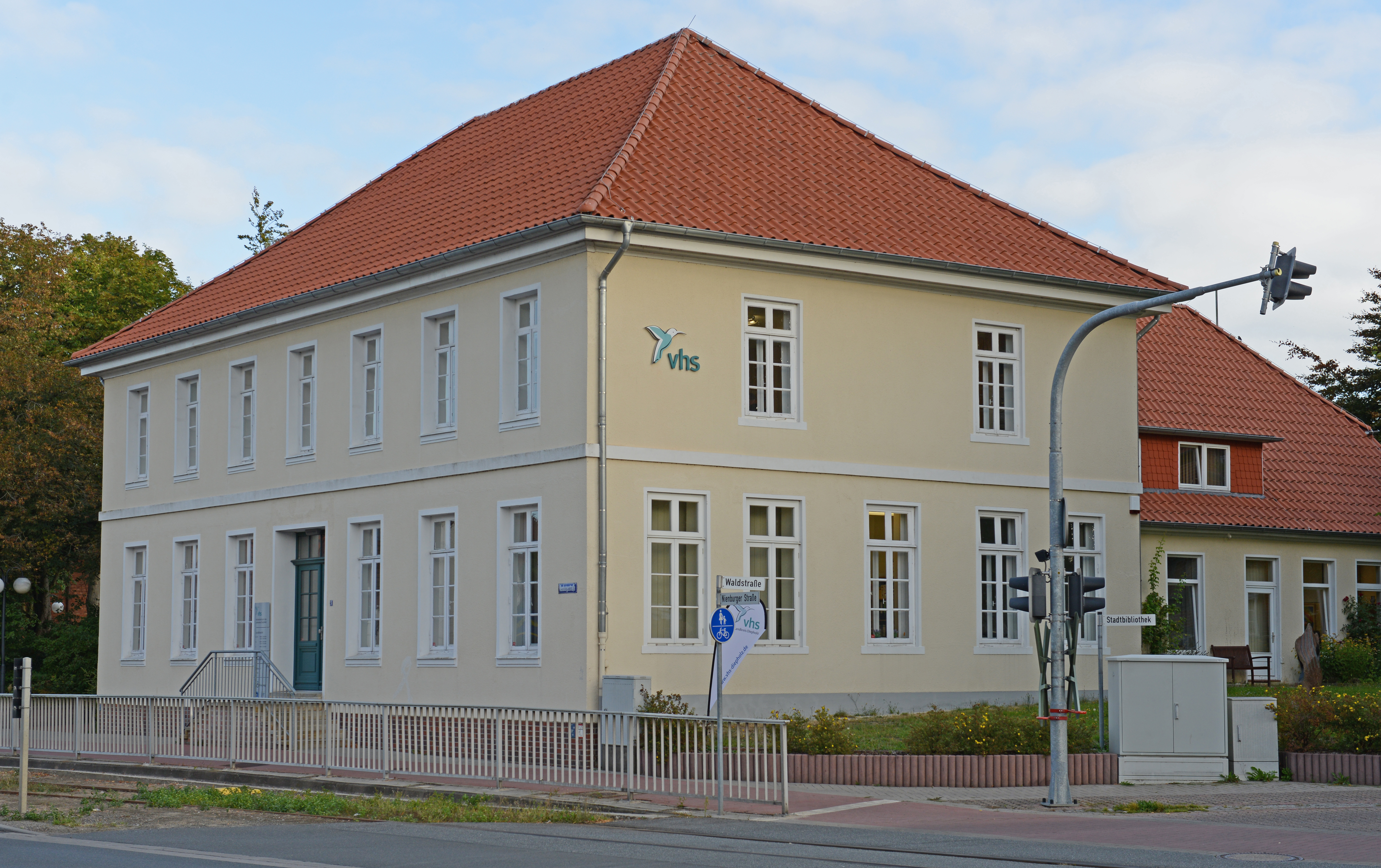 Baudenkmal in Syke, Nienburger Straße